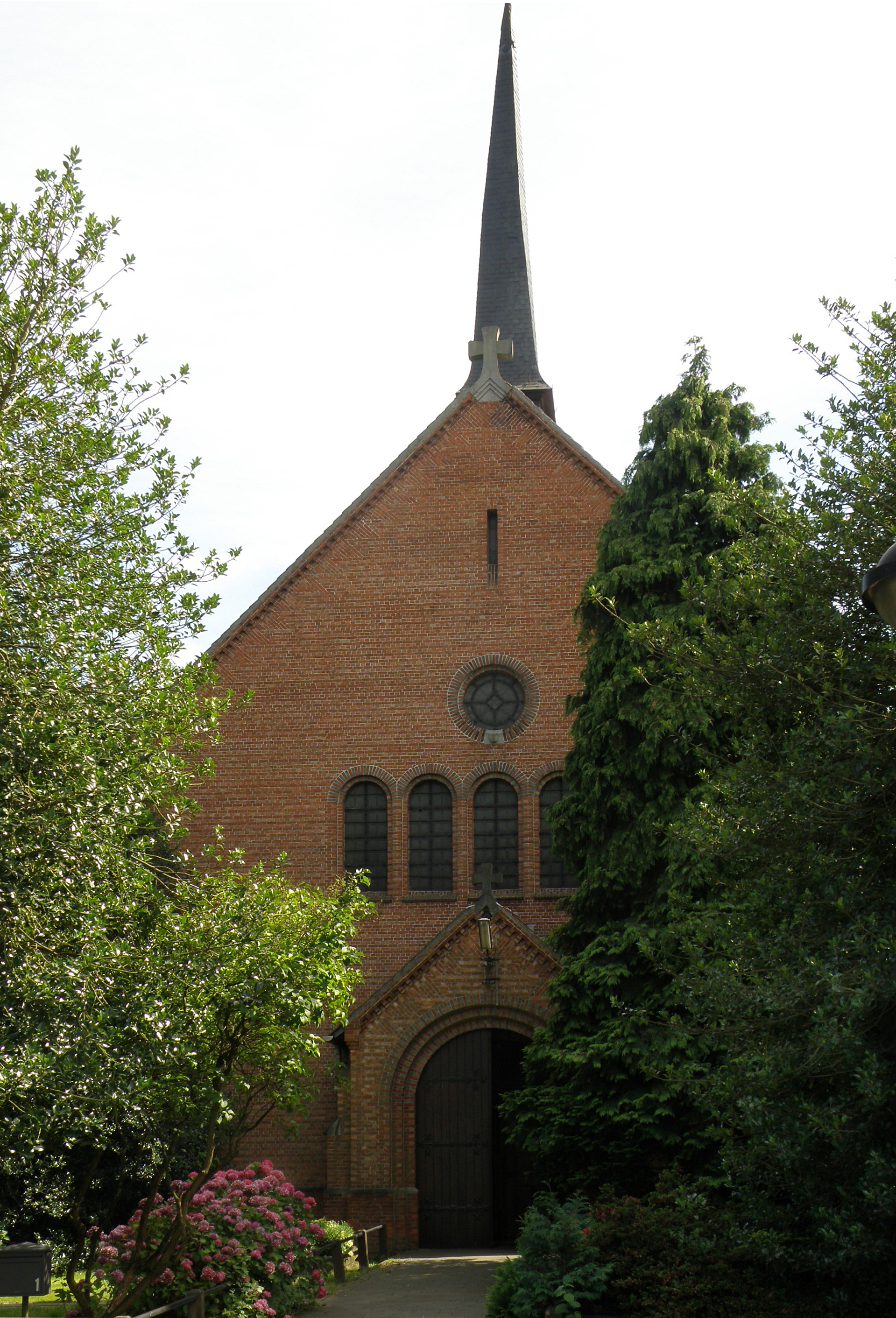 Edegem (prov. Antwerpen, België). Parochiekerk Heilige Familie.